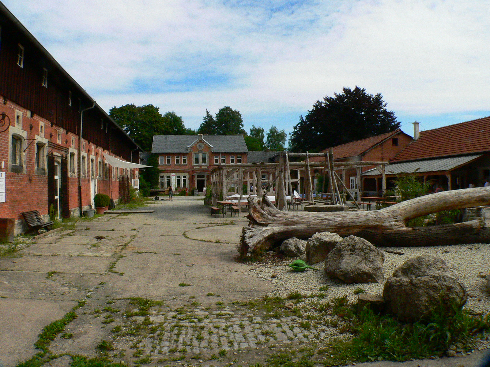 Musterfarm "Ernstfarm" von 1878 bei Coburg, Germany